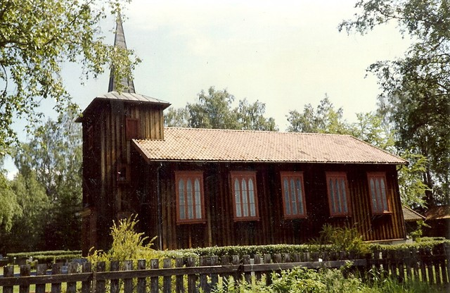 Ask kapell